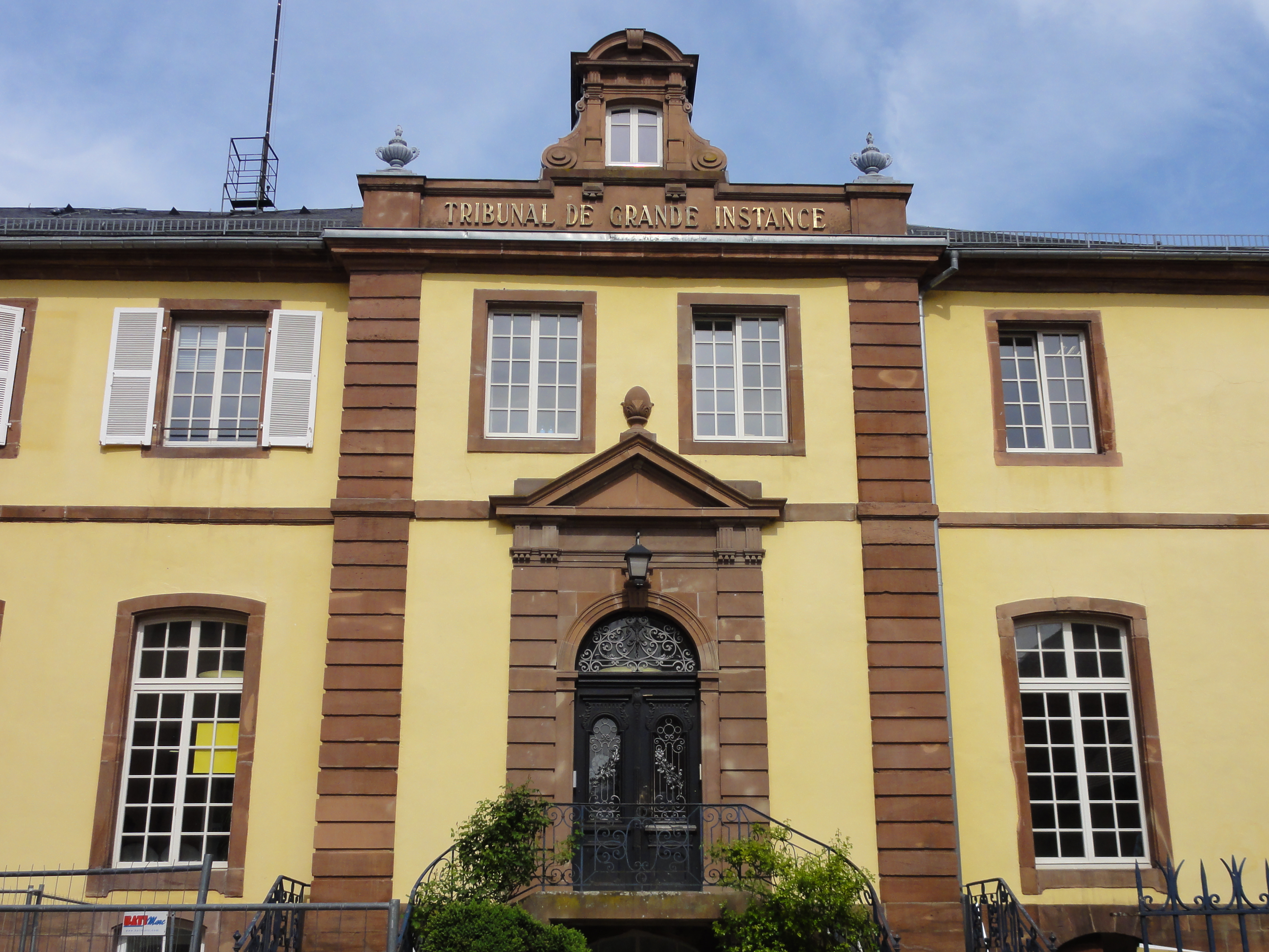 Alsace, Bas-Rhin, Saverne, Ancienne Chancellerie épiscopale (1738), aujourd'hui Tribunal de Grande Instance (XVIIIe-XIXe), rue du Tribunal.